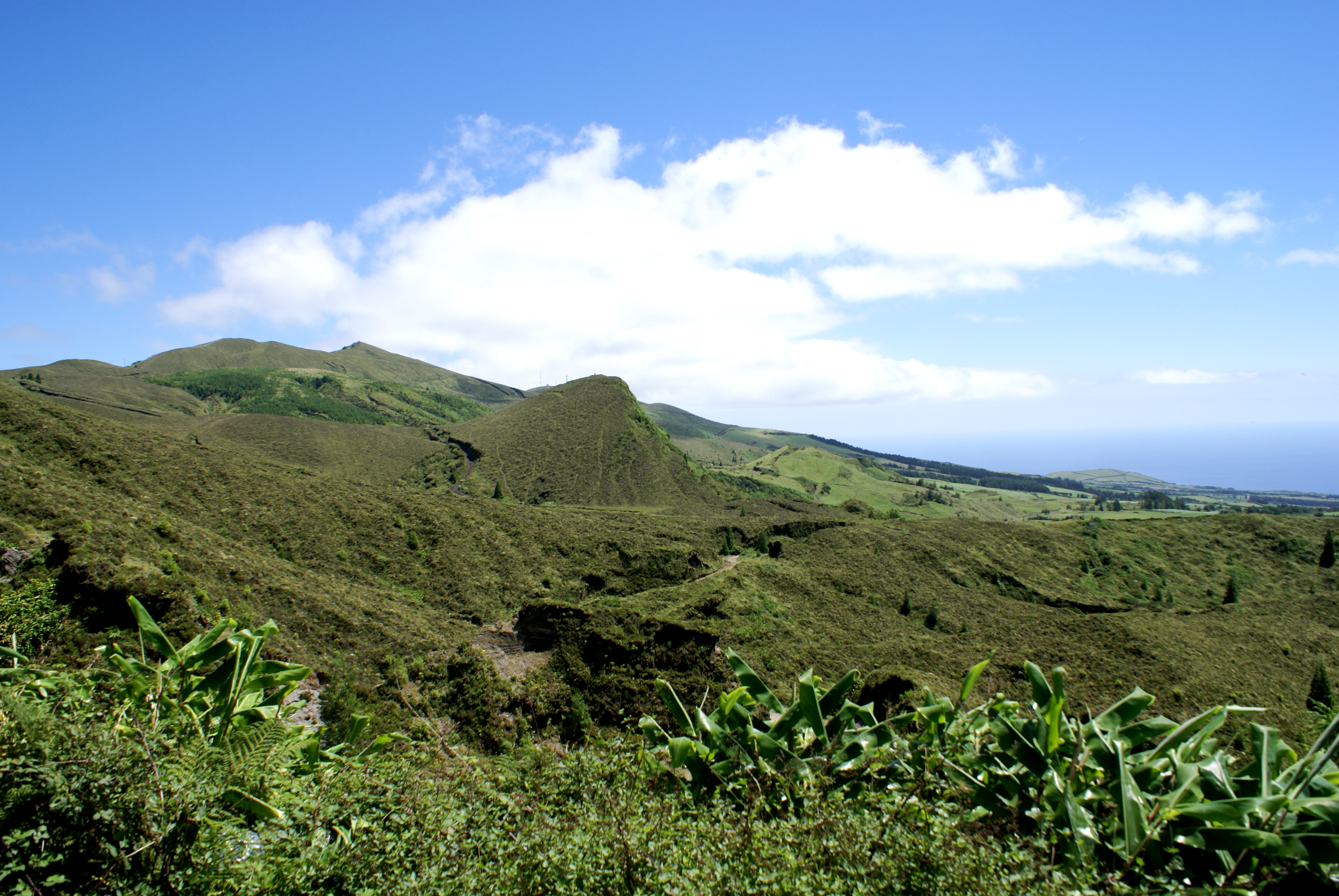 Zona das Sete Cidades, Miradouro do Pico do Carvão, ilha de São Miguel, Açores